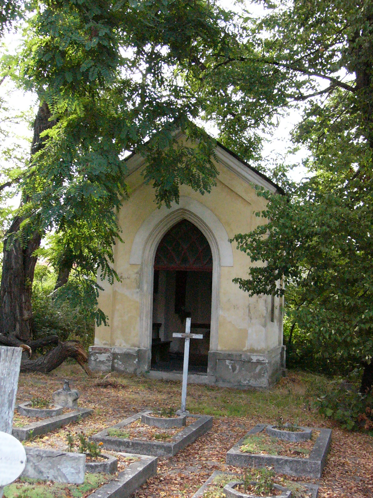 kaple svatého Josefa na Riebelsbergu v zahradě alžbětinského kláštera v Kadani